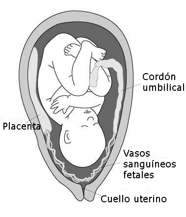 Vasa previa from a vilamentous insertion.